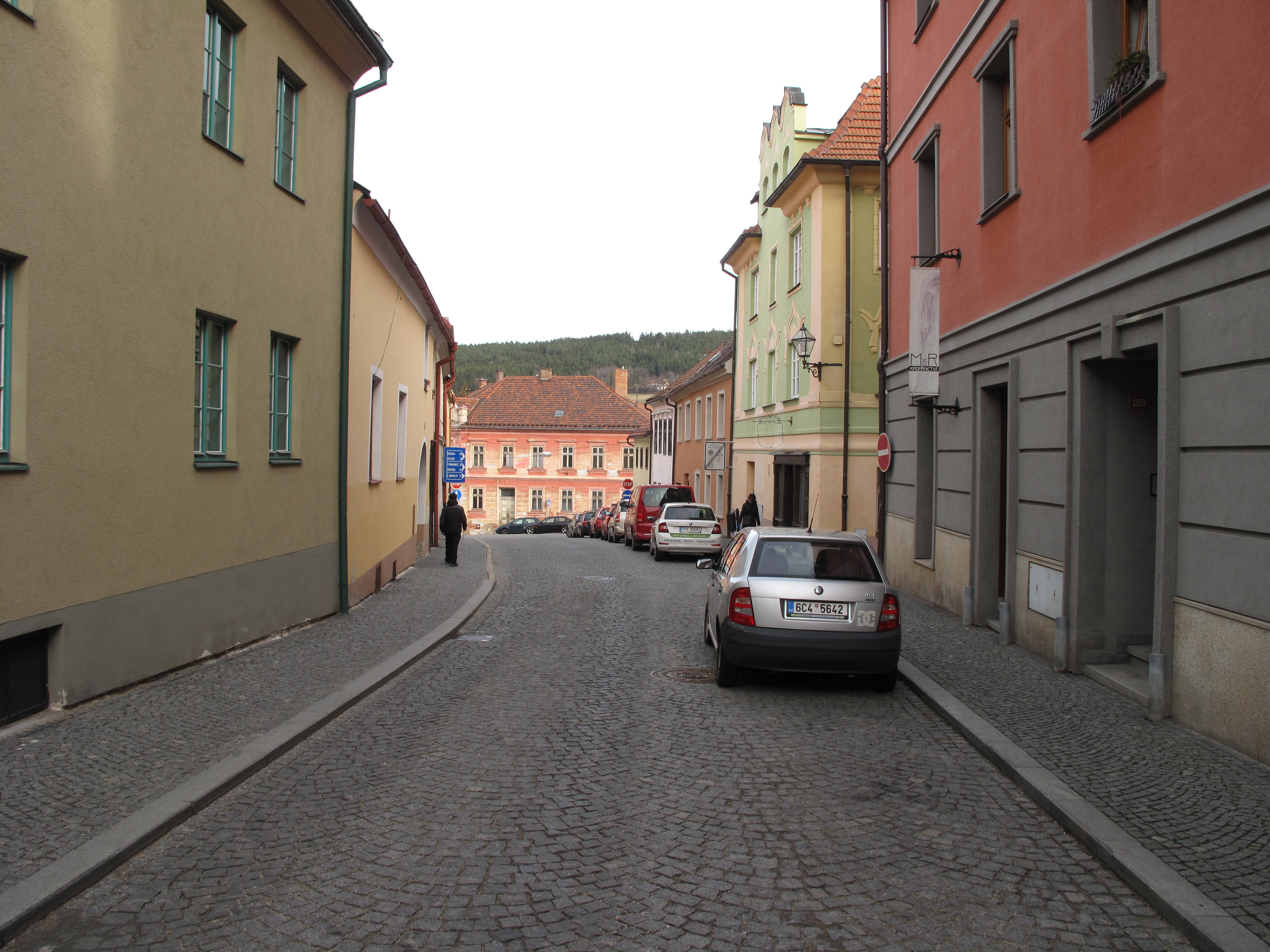 Ulice Husova v Prachaticích. Česká republika.